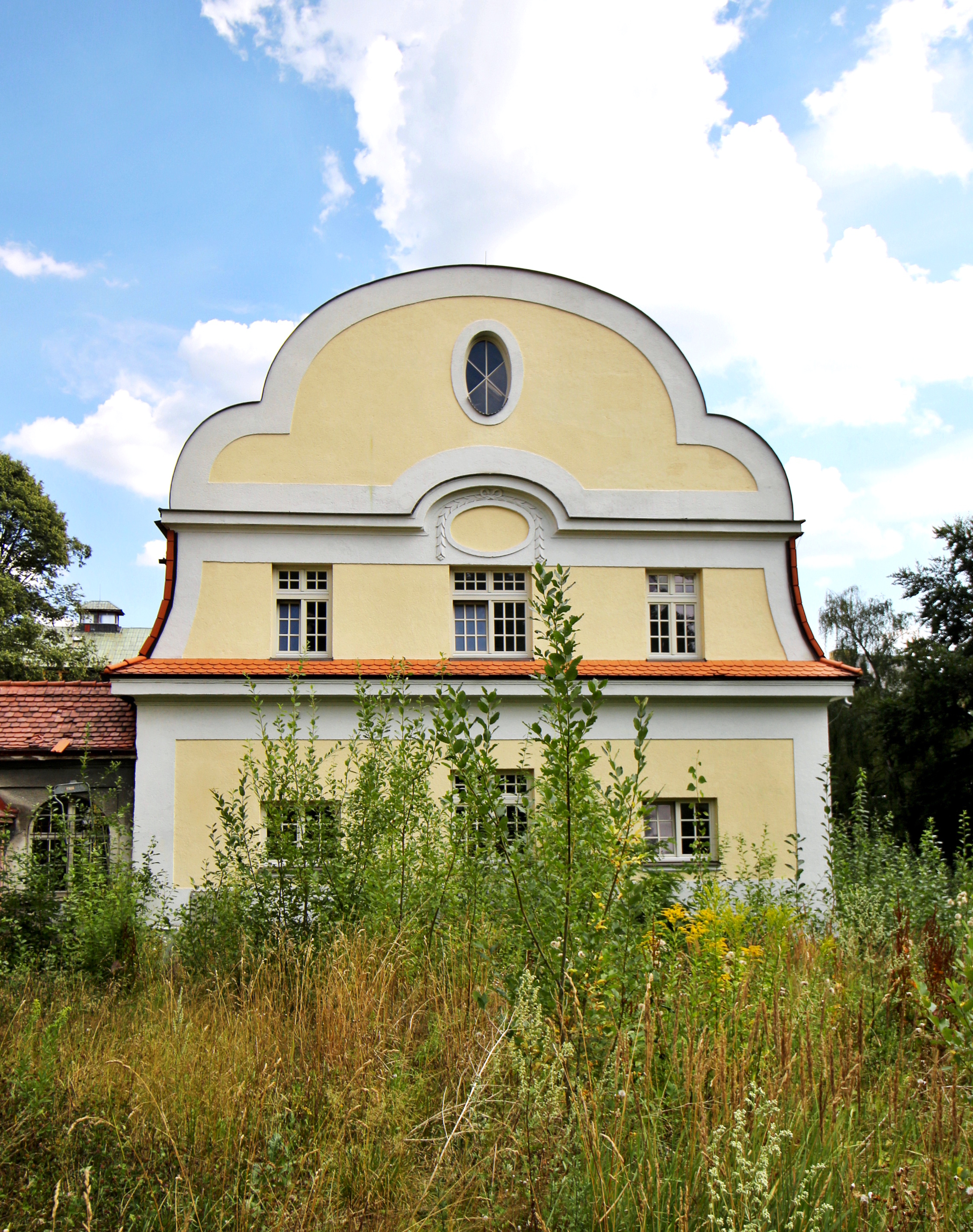 Kapucínský klášter a kostel sv. Máří Magdalény v Liberci